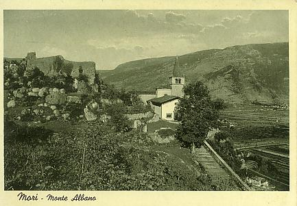 Castello e santuario di Montalbano, 1938; collezione privata; Trentino Alto Adige, Italia.